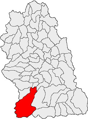 Categorie:Hărţi ale judeţului Hunedoara